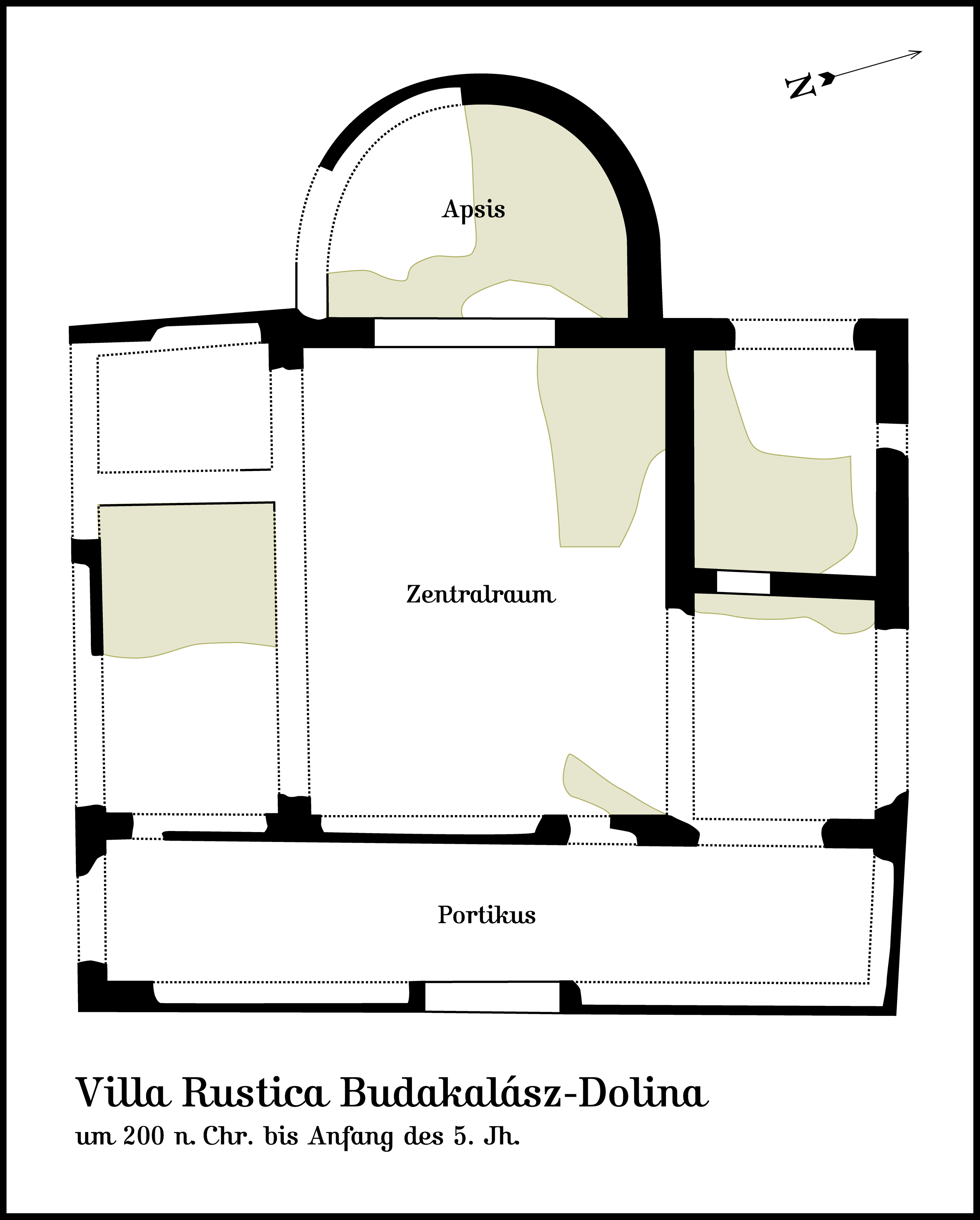 Die Villa Rustica Budakalasz-Dolina. Quellen: u.a. Edit B. Thomas: Römische Villen in Pannonien. Beiträge zur pannonischen Siedlungsgeschichte. Verlag der Ungarischen Akademie der Wissenschaften, 1964. S. 215. Gezeichnet in FreeHand MX für Macintosh; abgespeichert in Adobe Photoshop CS. Dies ist die Originalversion der Zeichnung.